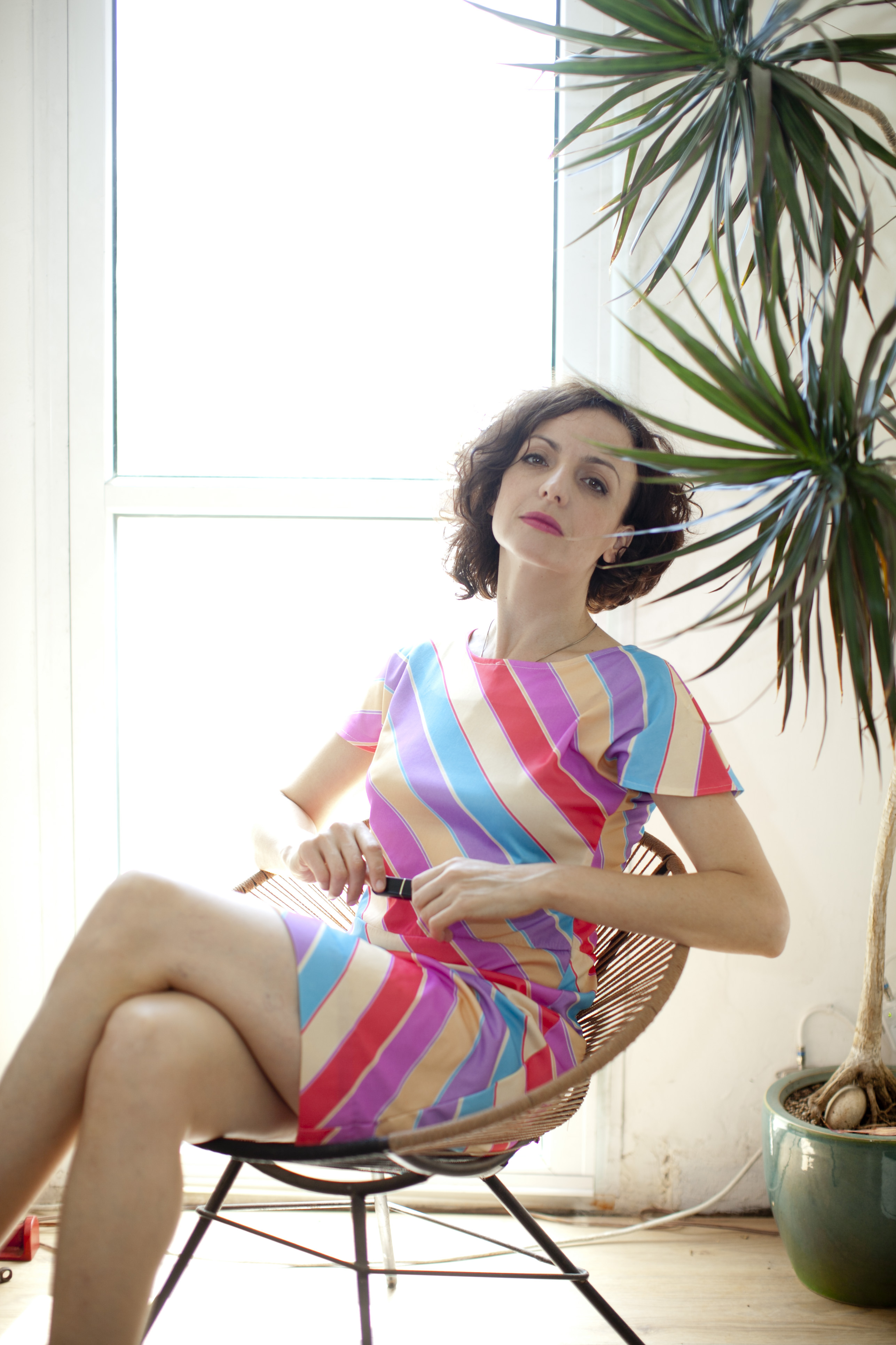 מיכל ויינברג כסבינה זאובר בהצגה "מיין ג'רוזלם" בתיאטרון תמונע